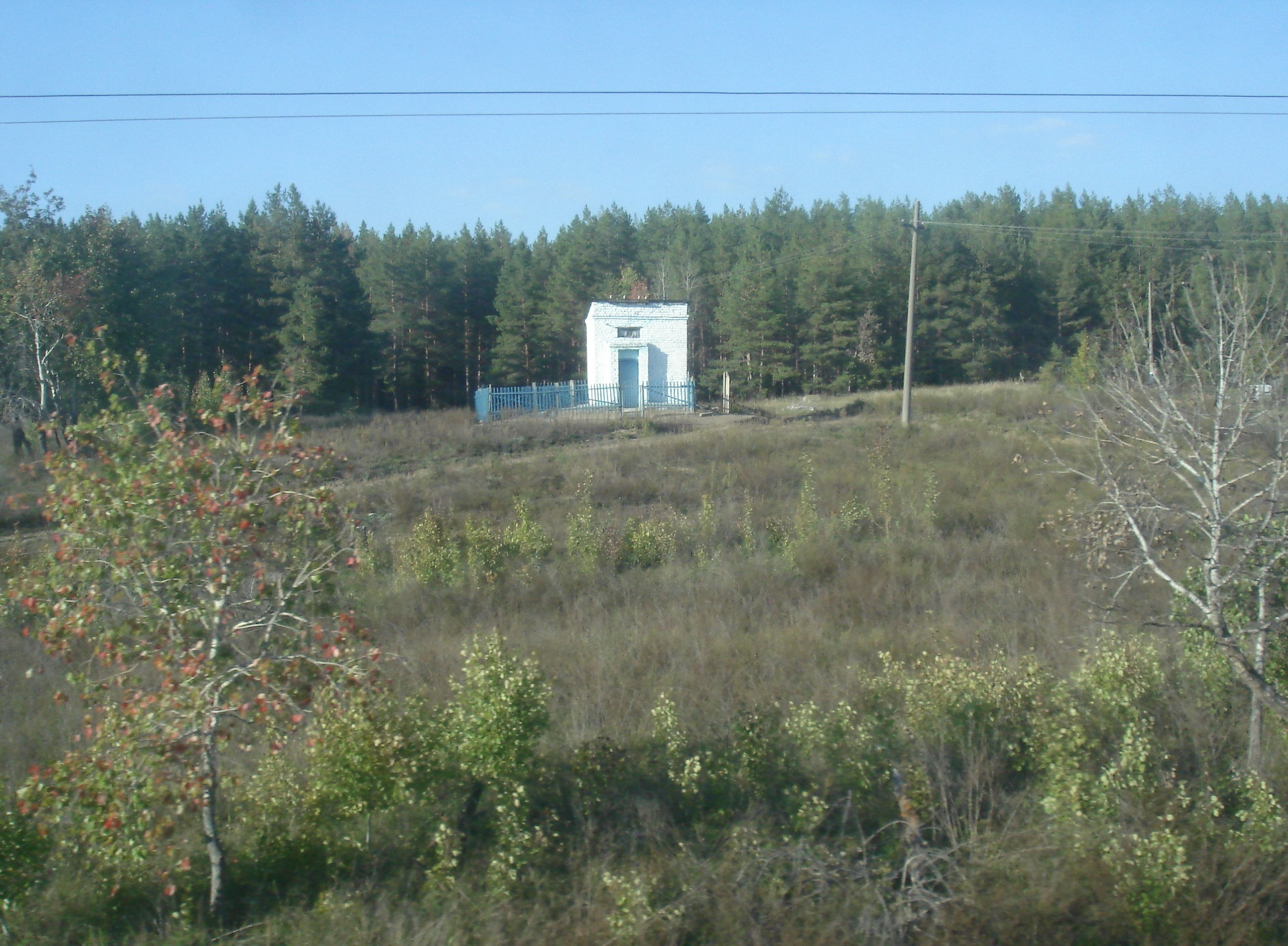 ЖД-станция Пискалы, станционное сооружение